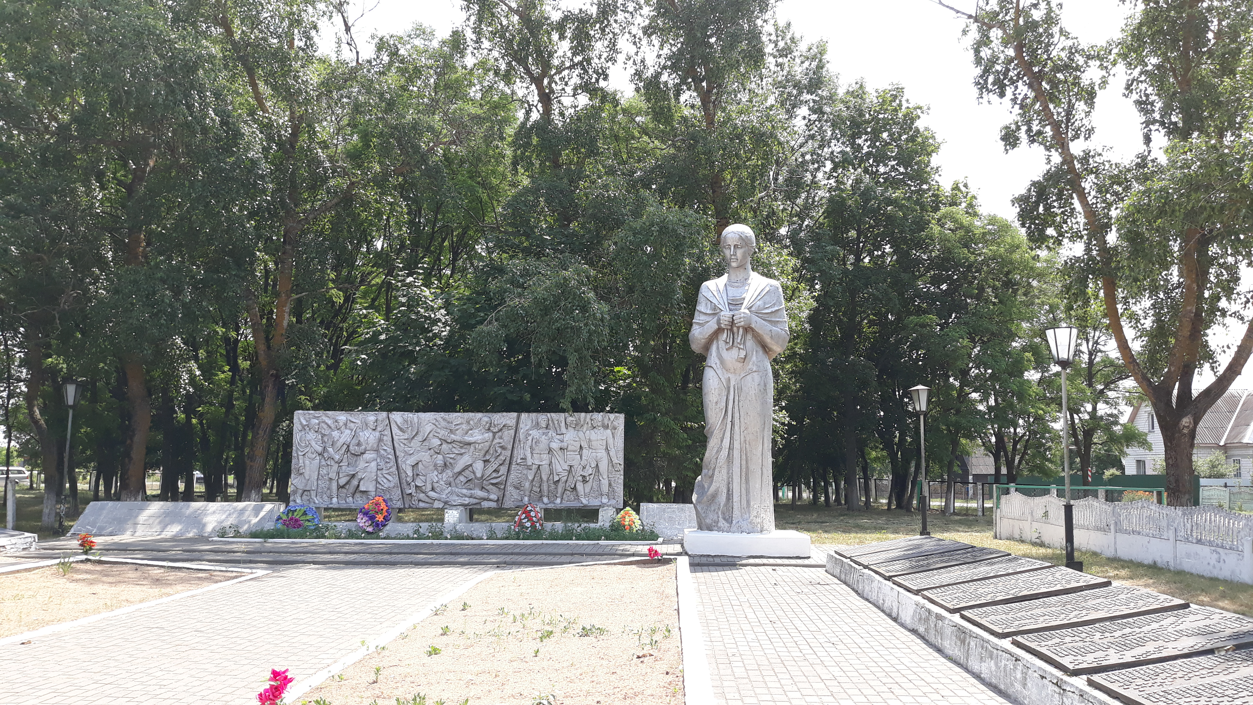 Ваенны мемарыял